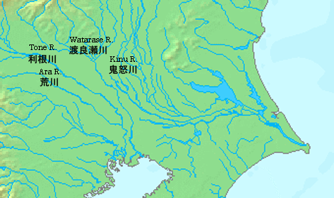 ja::画像:Japan_Kanto_Map_Chikei.gifから作成。